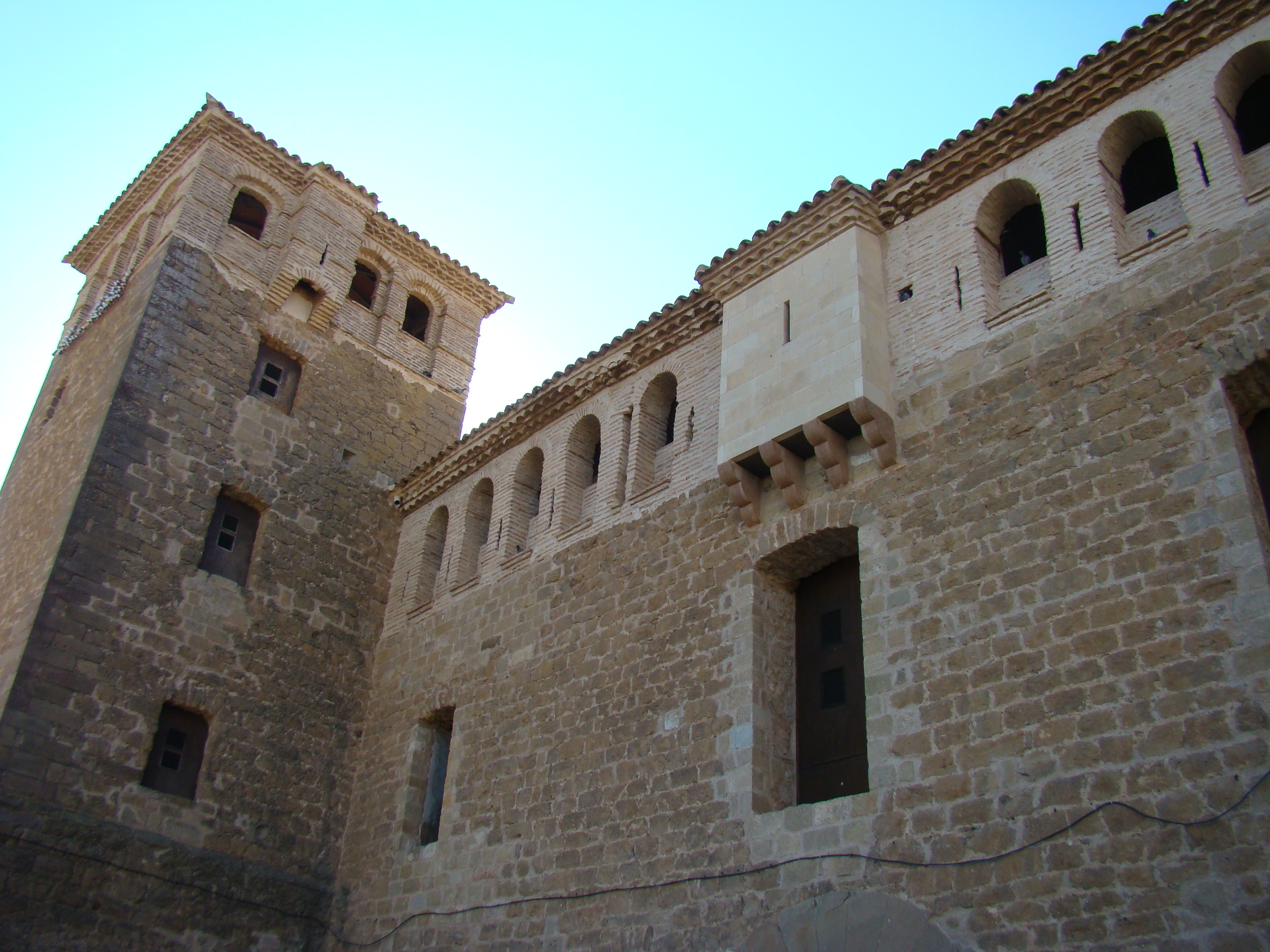 Palau fortificat dels Desvalls, o Castell dels marquesos d'Alfarràs, a Baells (Llitera).